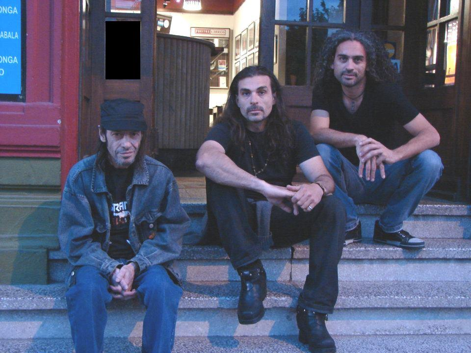 Engranaje. Osvaldo "Bocon" Frascino, Daniel Molinari y Adrian Domanski. Previa a un show en Montevideo